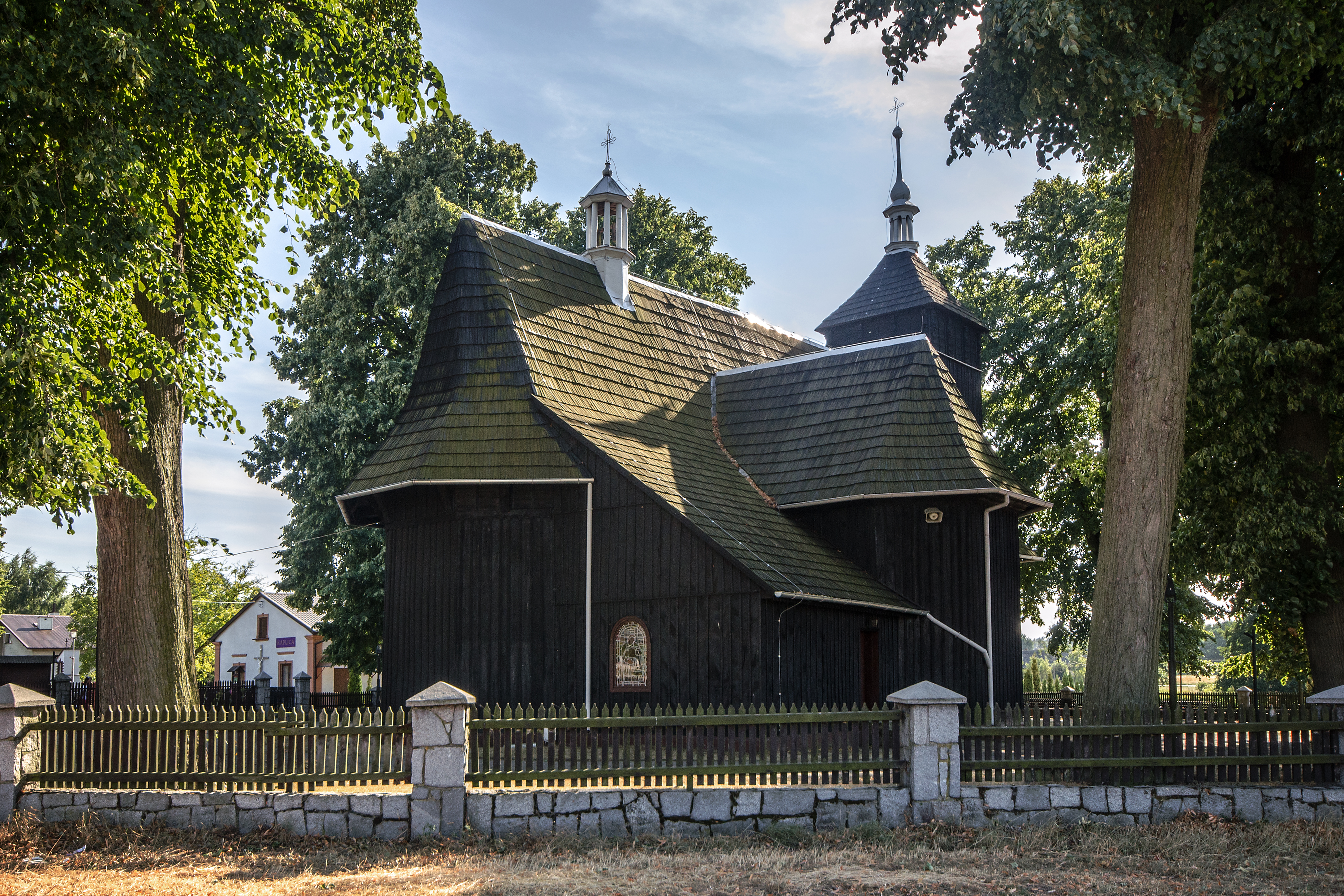 Jaworzno, kościół par. p.w. Św. Trójcy, XVI, 1921-1923